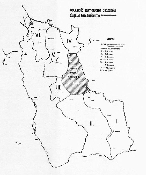 Ceremonial ship launching of ORP Sęp in Rotterdam (1938-10-17)